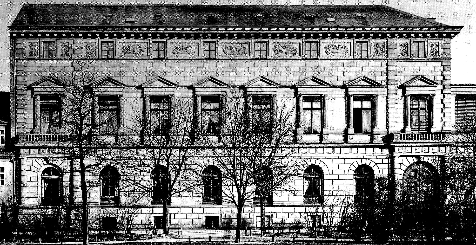 Dresden Palais Kaskel-Oppenheim, Außenfassade